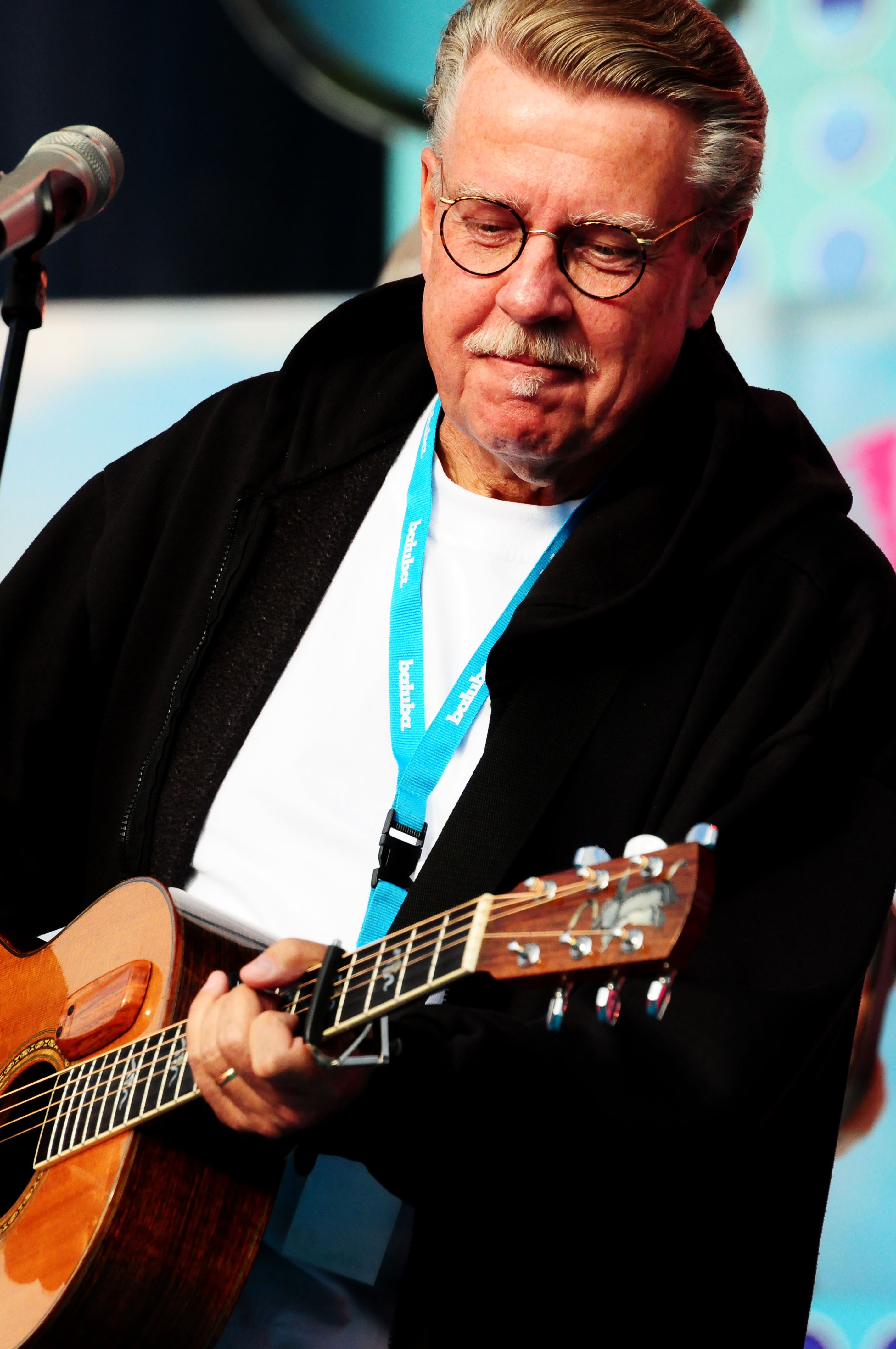 Mikael Wiehe på Sommarkrysset 2012